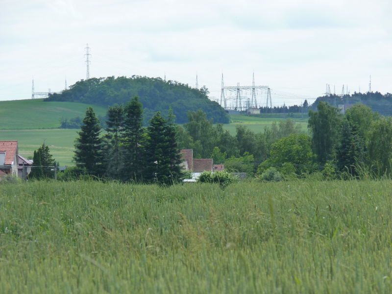 Chlum, 412 m n.m. Plzeň-město